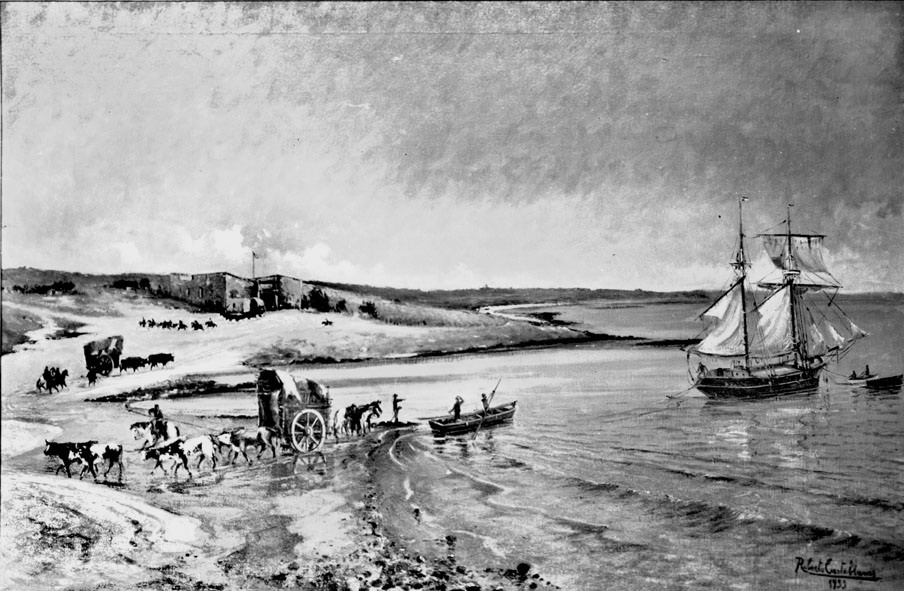 Cuadro que representa el desembarco de productos en la llamada "aduana de Oribe", que había sido instalada por el Gobierno del Cerrito en el marco de la Guerra Grande de Uruguay.